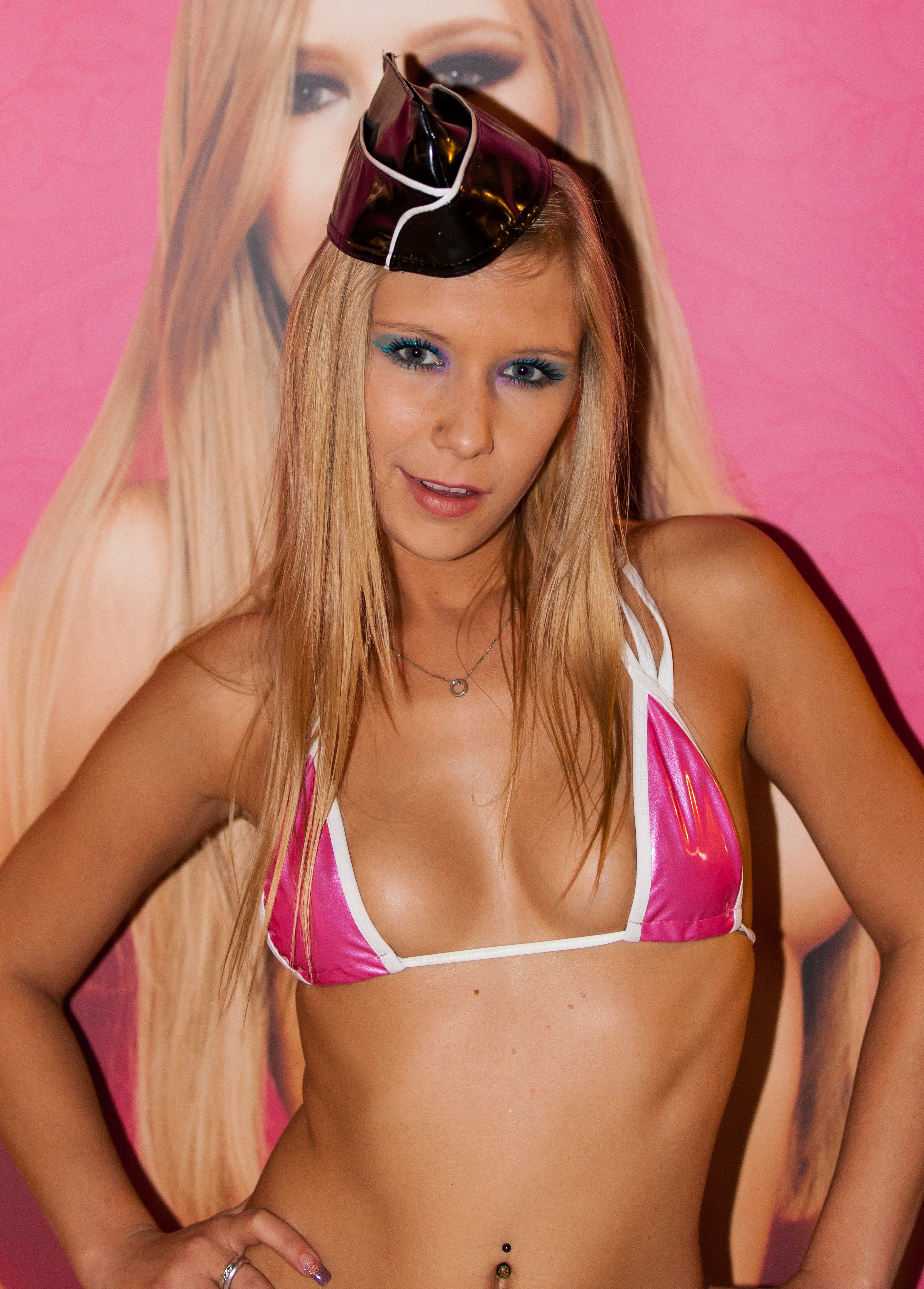 Lena Nitro bei der Erotikmesse 2011 in Mannheim